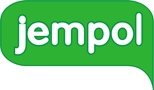 Logo Kartu XL Jempol